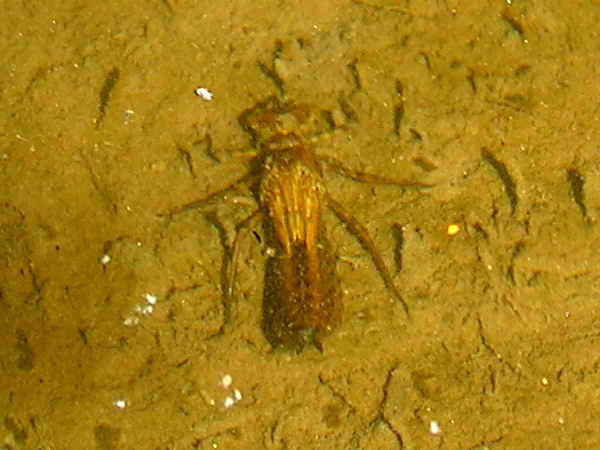 Foto tirada cunha Nikon E8800. Self made. Mandaio - Oza - Galicia - Spain Larva de libélula. Dragonfly